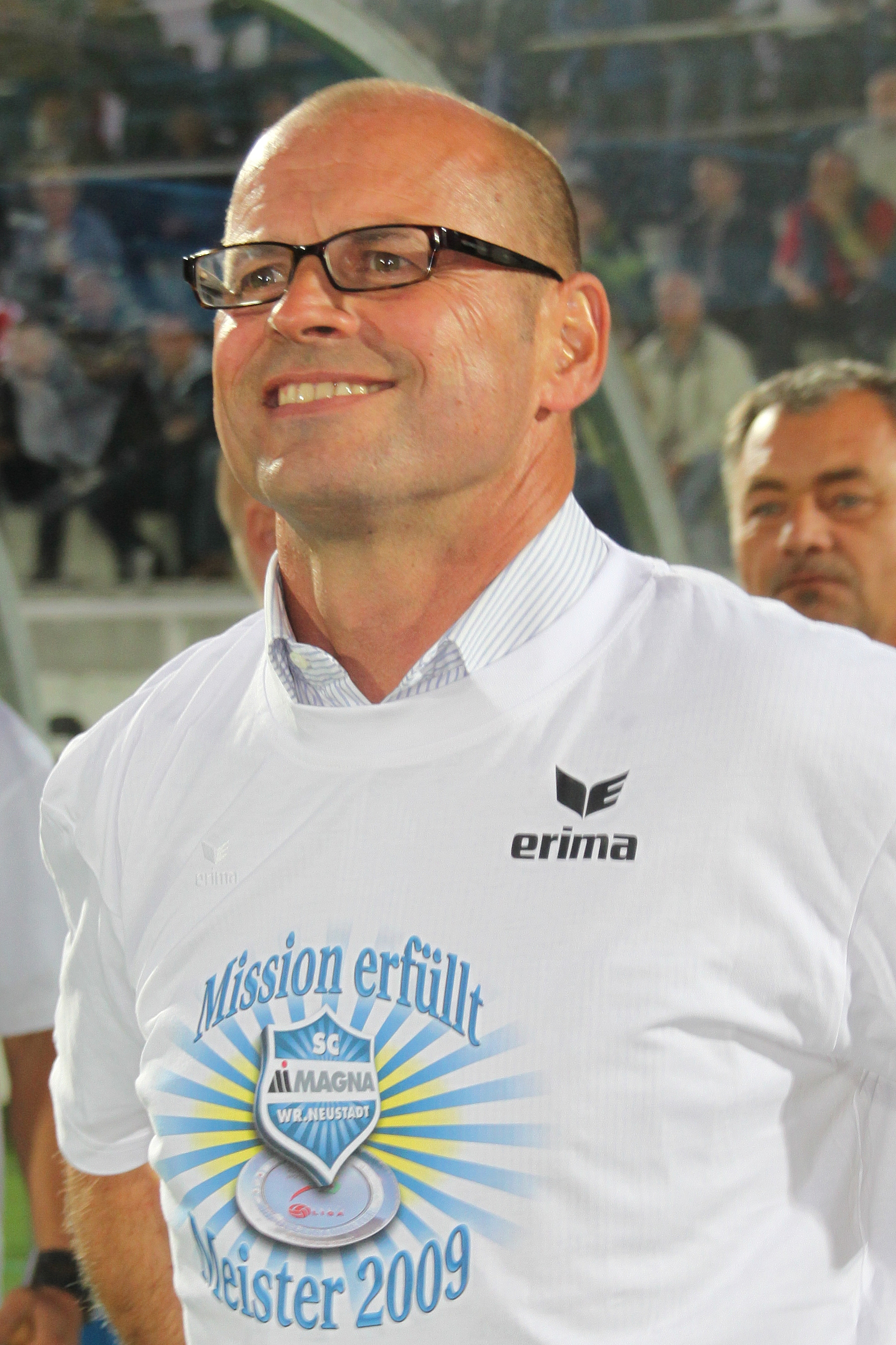 Helmut Kraft als Meistertrainer (Bild 1)